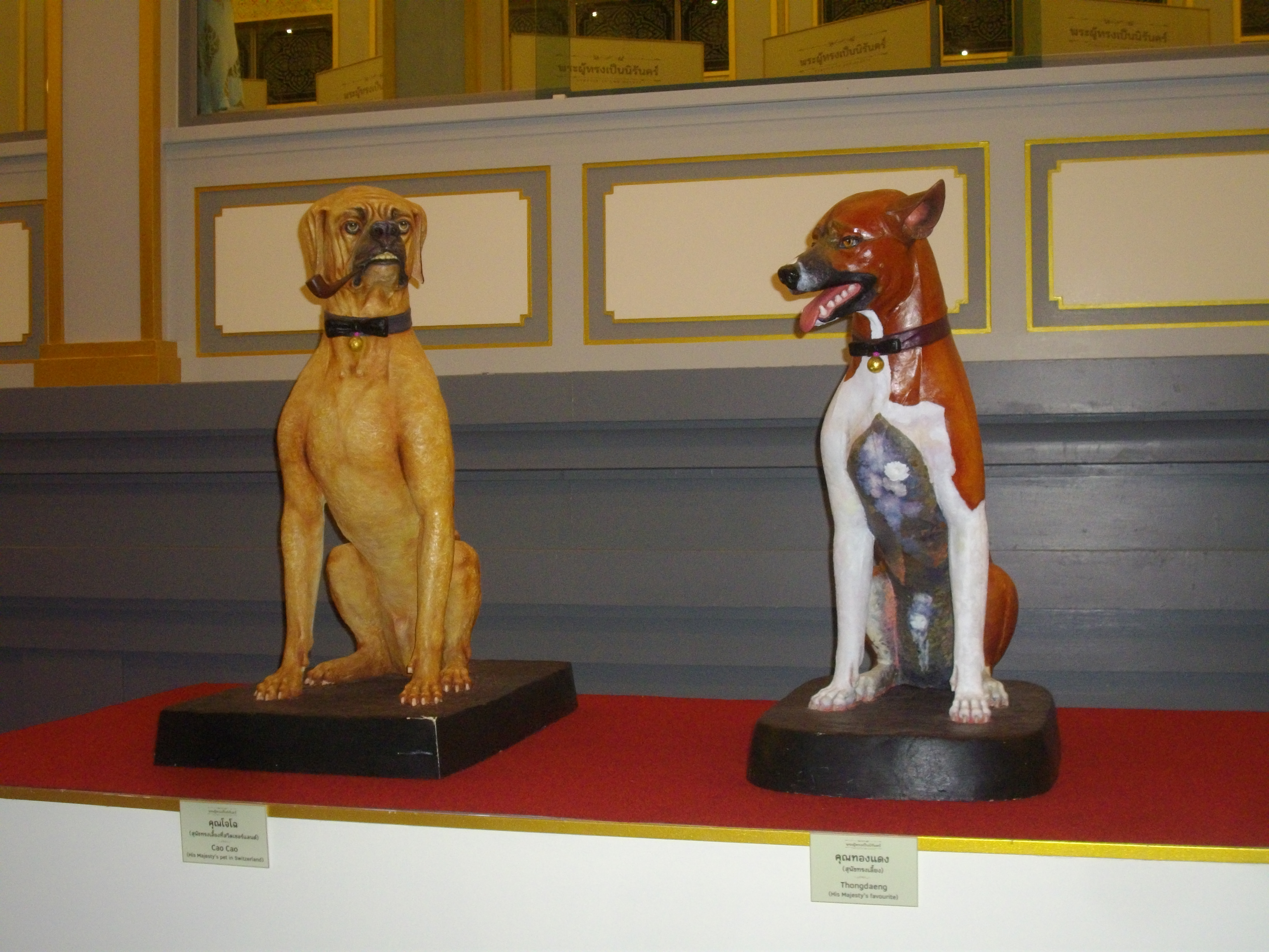 ประติมากรรมคุณโจโฉและคุณทองแดง สุนัขทรงเลี้ยงในพระบาทสมเด็จพระปรมินทรมหาภูมิพลอดุลยเดช สยามินทราธิราช บรมนาถบพิตร ผลงานการปั้นของนายชิน ประสงค์ ข้าราชการบำนาญ กรมศิลปากร จัดแสดงที่หน้าพระที่นั่งทรงธรรม ในนิทรรศการงานพระราชพิธีถวายพระเพลิงพระบรมศพ พระบาทสมเด็จพระปรมินทรมหาภูมิพลอดุลยเดช ระหว่งวันที่ 2-30 พฤศจิกายน 2560 ณ พระเมรุมาศ ท้องสนามหลวง กรุงเทพฯ